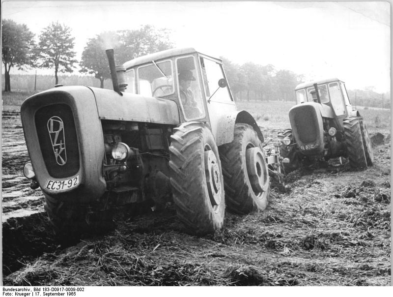 LPG Zinndorf, Tiefpflügen Zentralbild Krueger krue 17.9.1965 Meliorativ pflügen Kollegen des VEB Meliorationsbau Bad Freienwalde auf einem Schlag der LPG Zinndorf im Kreis Straußberg mit zwei ungarischen Traktoren vom Typ D4K und einem Spezialtiefkulturpflug.Melioratives Pflügen ist eine Methode der Bodenbearbeitung zur Verbesserung der Ertragsfähigkeit leichter Sandböden in Trockenlagen.Die meliorative Pflugfurche hat eine Tiefe von 40-45 cm, wodurch eine grundlegende Veränderung des Bodenprofils erfolgt.